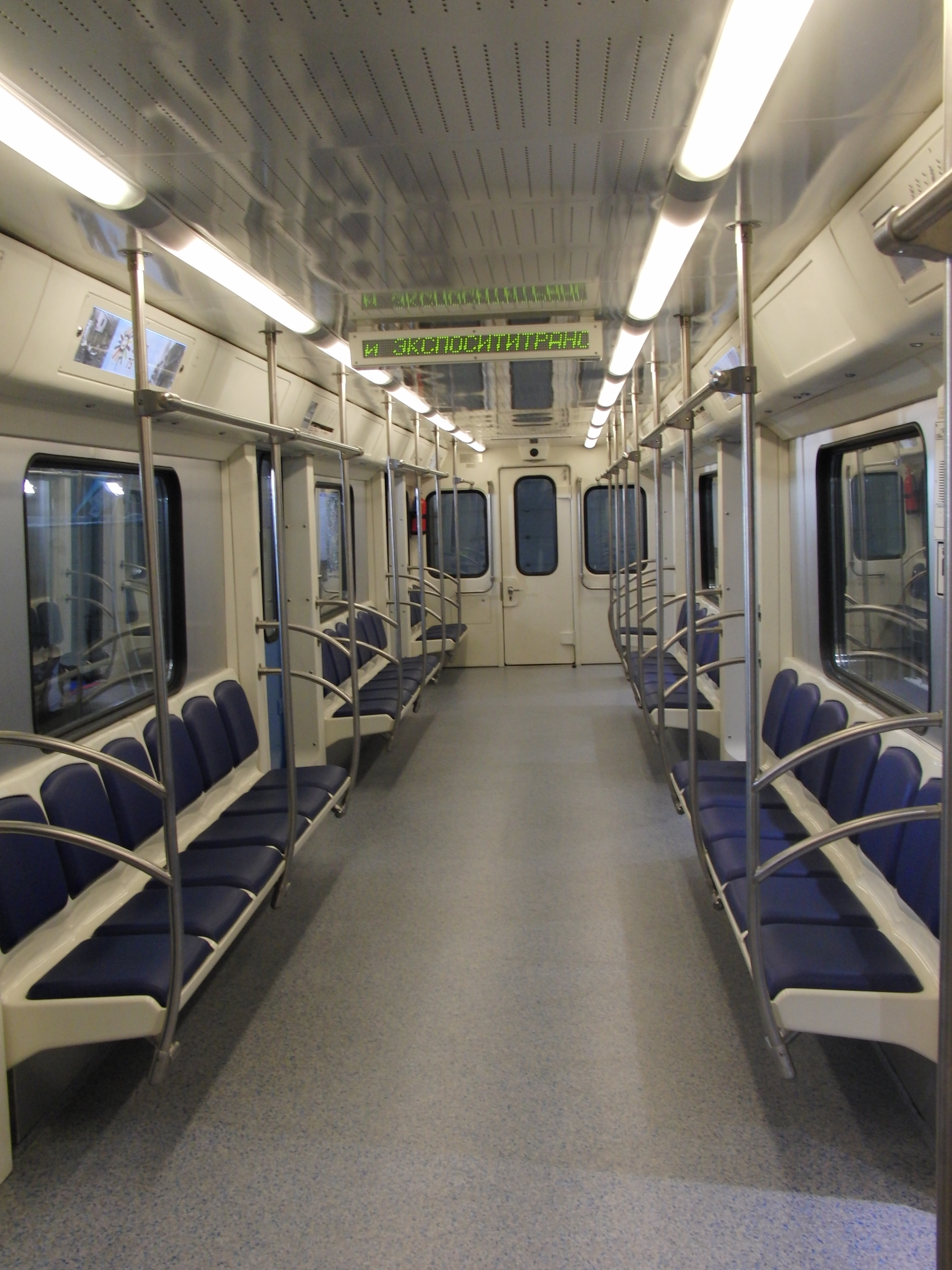 Вагон типа 81-760 на выставке «Экспосититранс 2010».